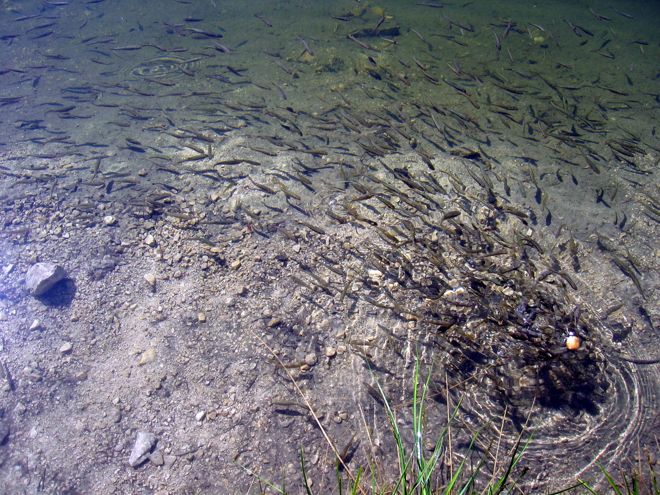 Elritzen im Wildensee, Totes Gebirge, Österreich